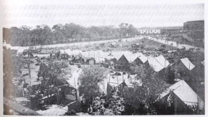 Feria de Zafra